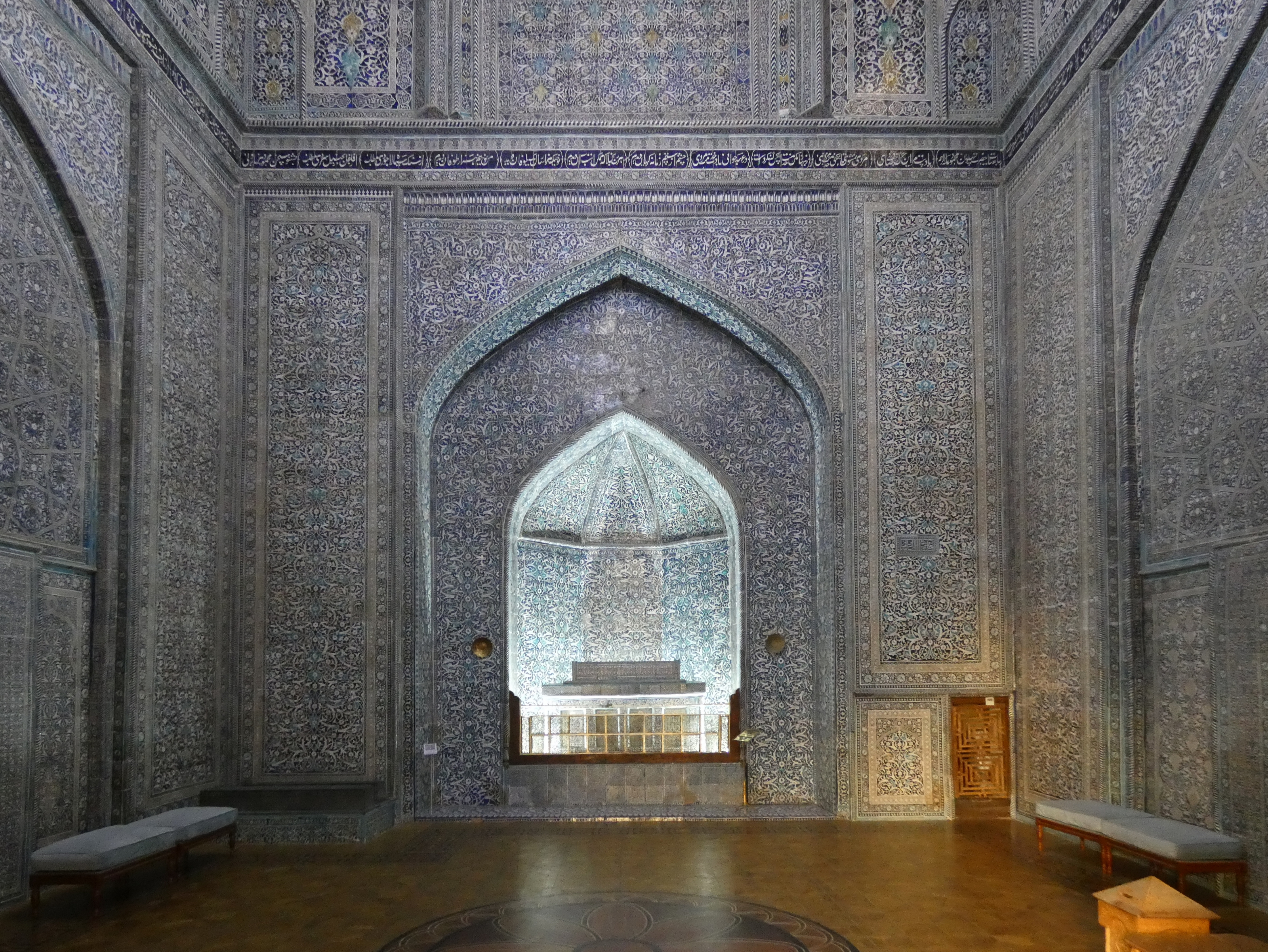 Khanqah Gedenkstätte Pahlawan Mahmud mit Sarkophag Muhammad Rahim I. in mittiger Nische, zwei weitere Sarkophage in linker hinterer Ecke